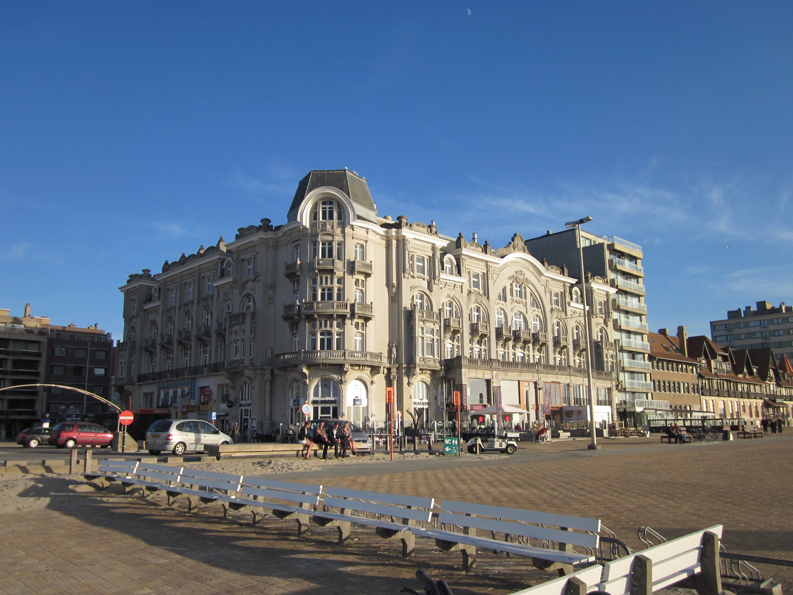 White Residence (Le Grand Hôtel), Hendrikaplein en Zeedijk in Nieuwpoort-Bad 61″ N, 2° 43′ 09.98″ E